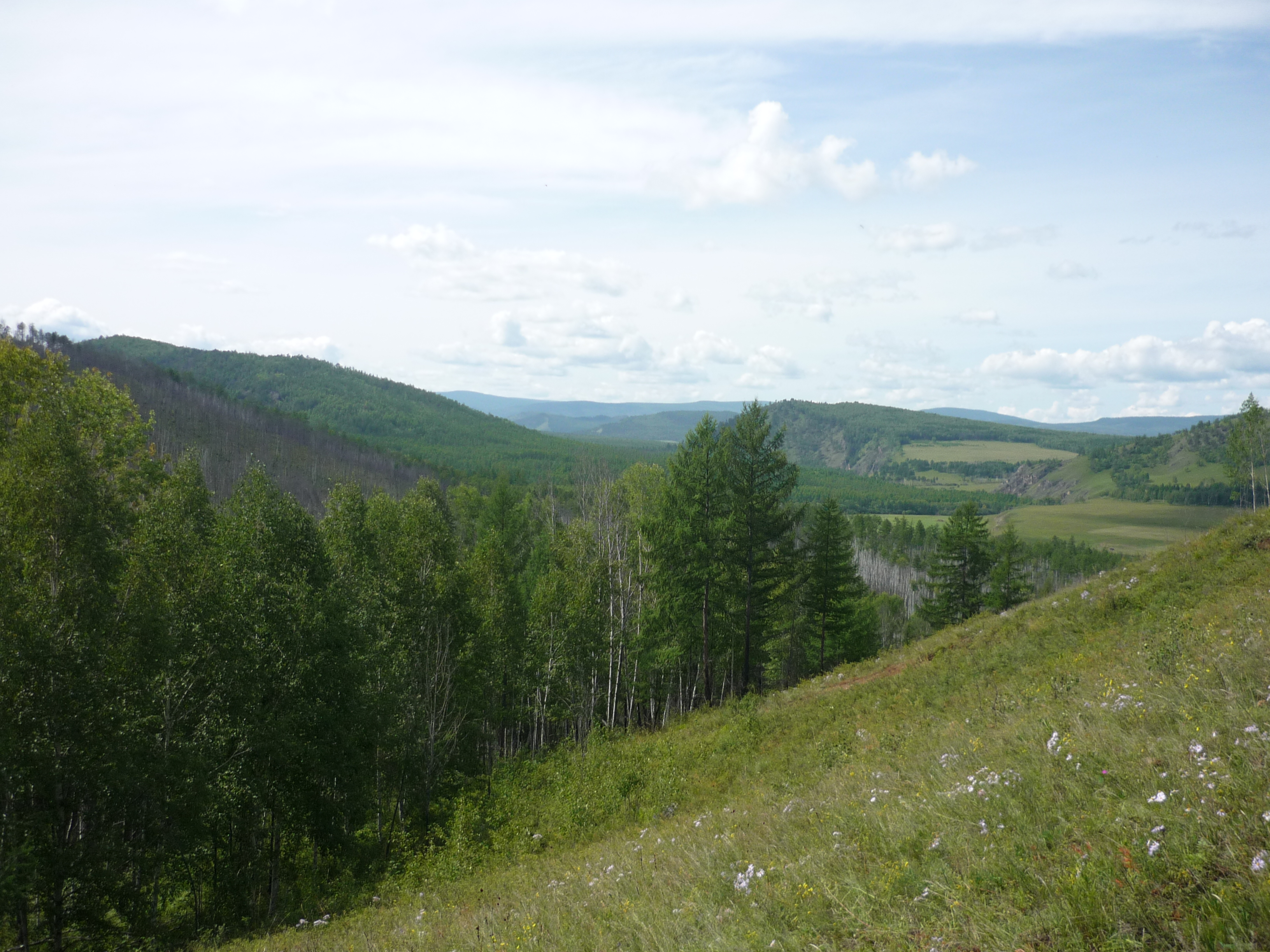 Падь Дубняки: Газимуро-Заводский район, This image is related to the protected area of Russia number 7510027